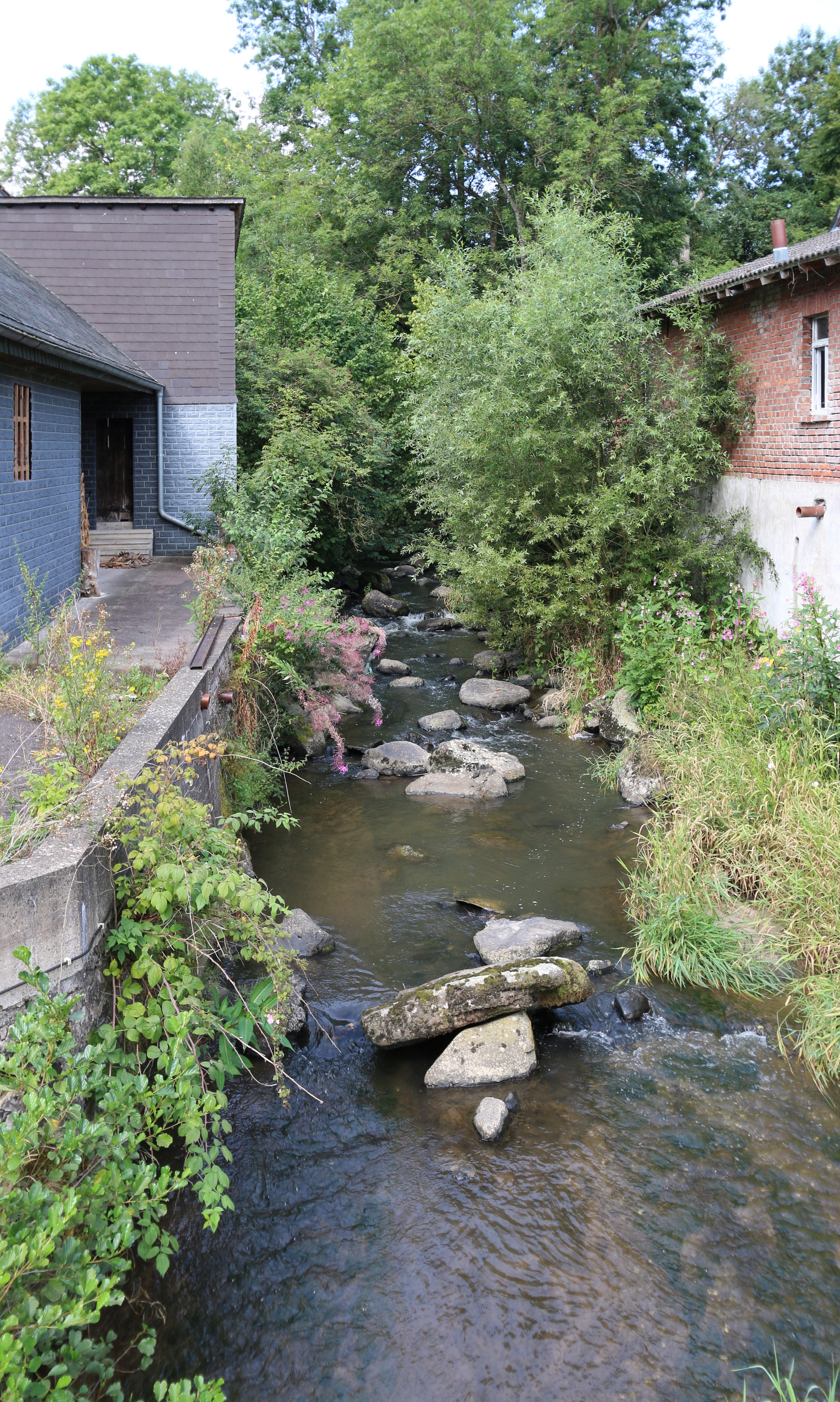 Willmenrod, Westerwlad: Elbbach